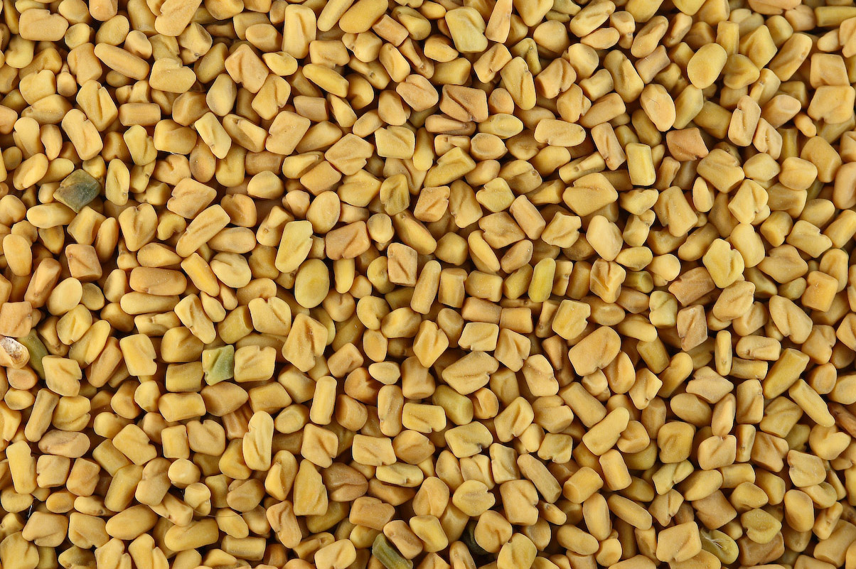 Fenugreek seeds.